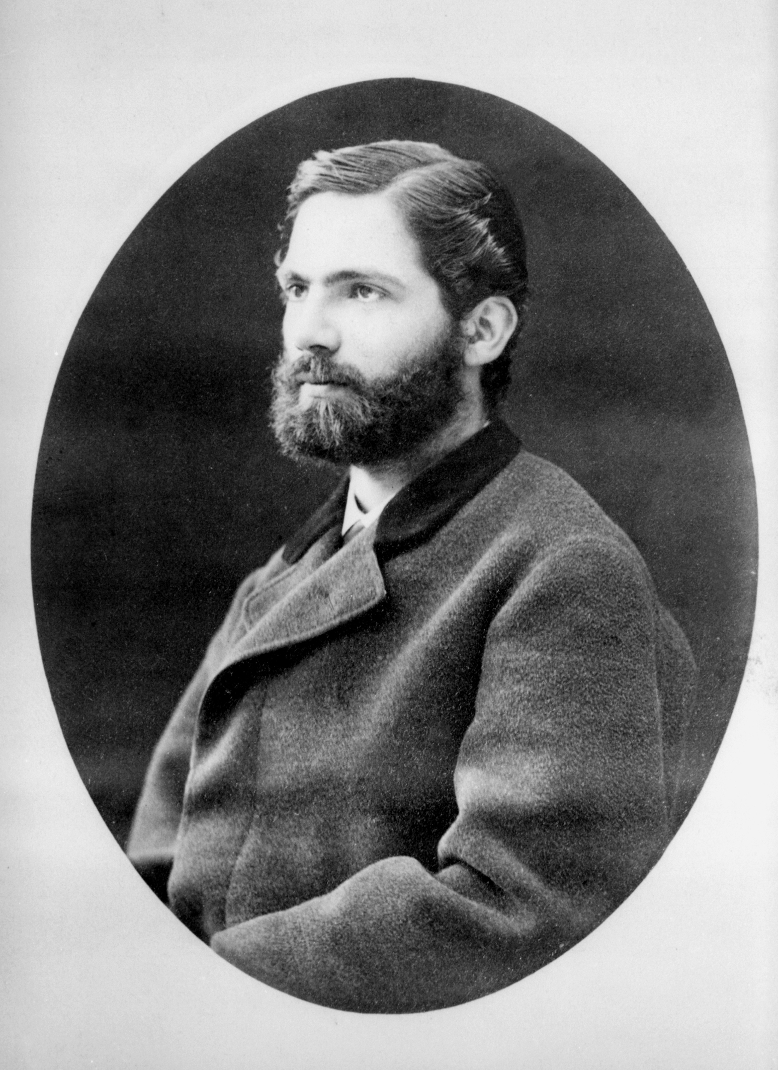 Augusto Antonio Orrego Luco (Valparaíso, Chile, 2 de mayo de 1849 - ibídem, 26 de agosto de 1933) fue un psiquiatra chileno que perteneció a la generación ilustrada de tendencia liberal, progresista y laica, y que participó activamente en los gobiernos de la época liberal y en la Guerra Civil de 1891, también llamada Revolución de 1891. Llegó a ser designado como ministro de dos gobiernos y electo como diputado.